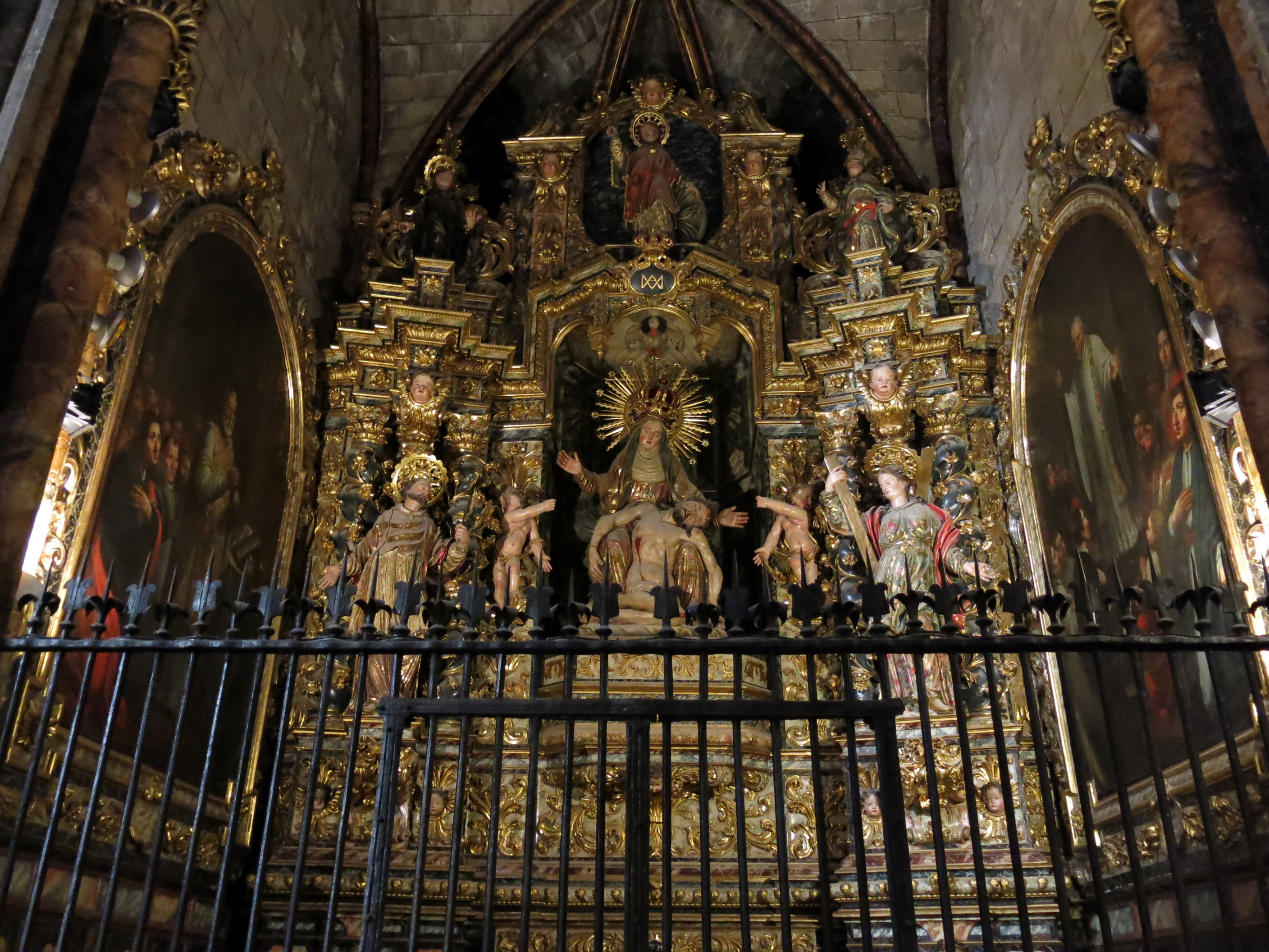 Catedral de Santa Maria (Girona)